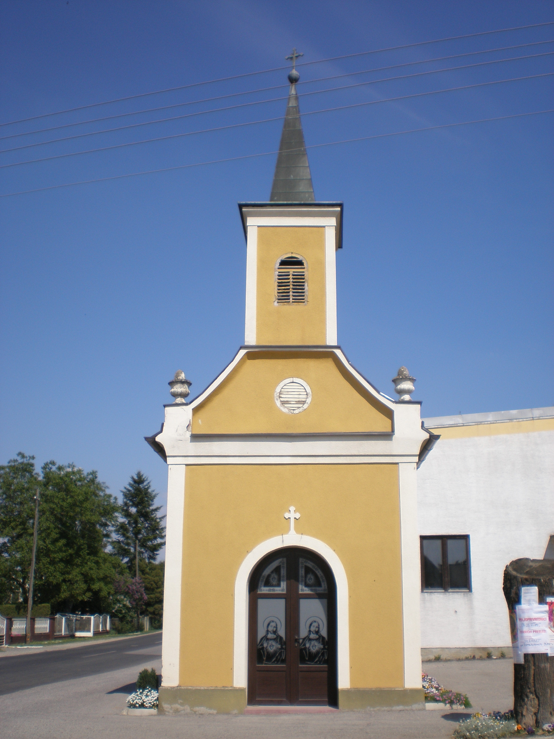 Kapela u Imbriovcu